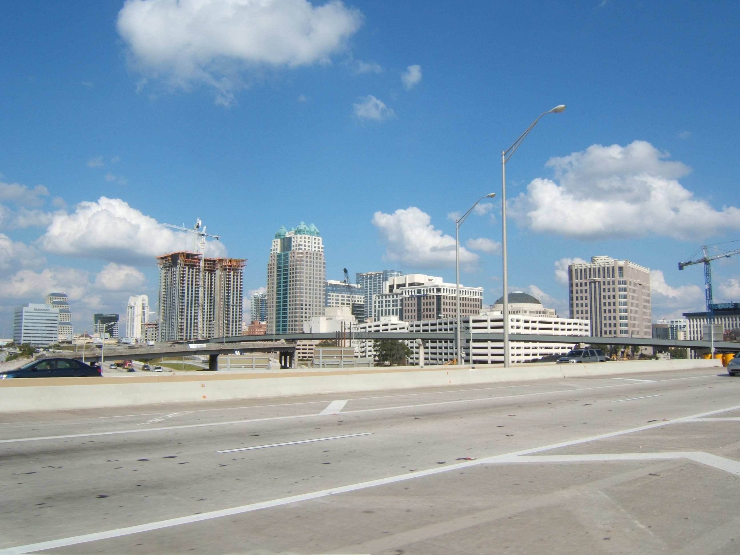 Orlando en Floride.